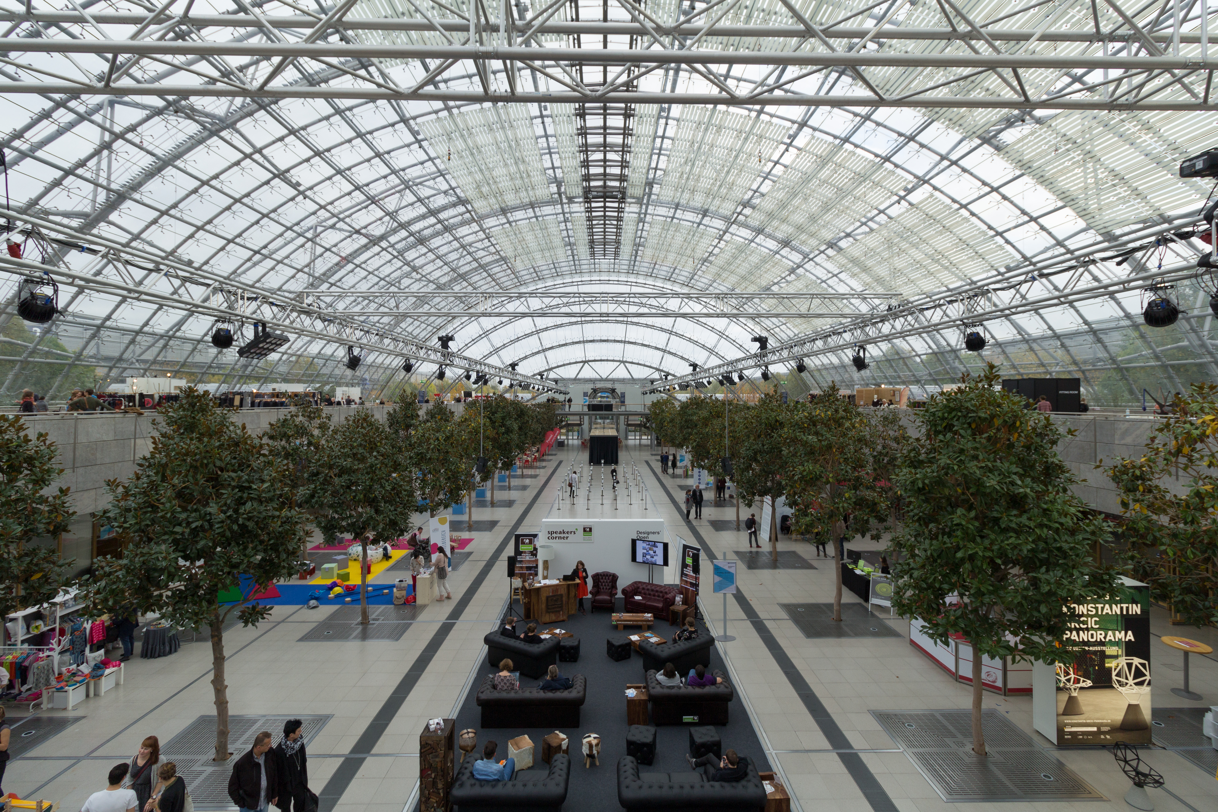 Glashalle Neue Messe Leipzig